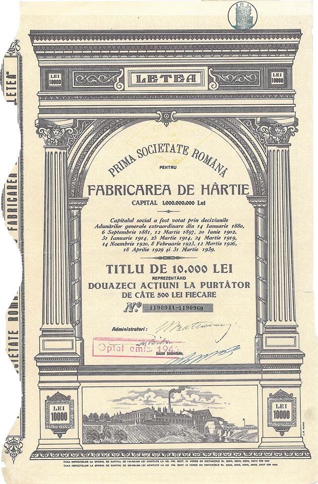 Titlu de 10.000 lei reprezentând 20 de acțiuni la purtător de câte 500 lei fiecare.